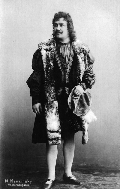 Modest Menzinsky i Mästersångarna